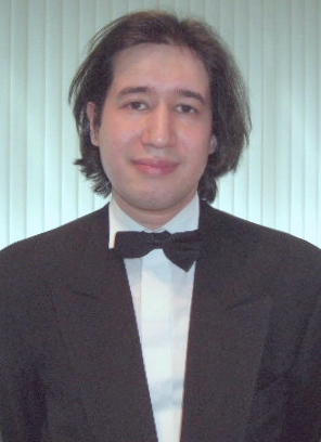 Amir Tebenikhin